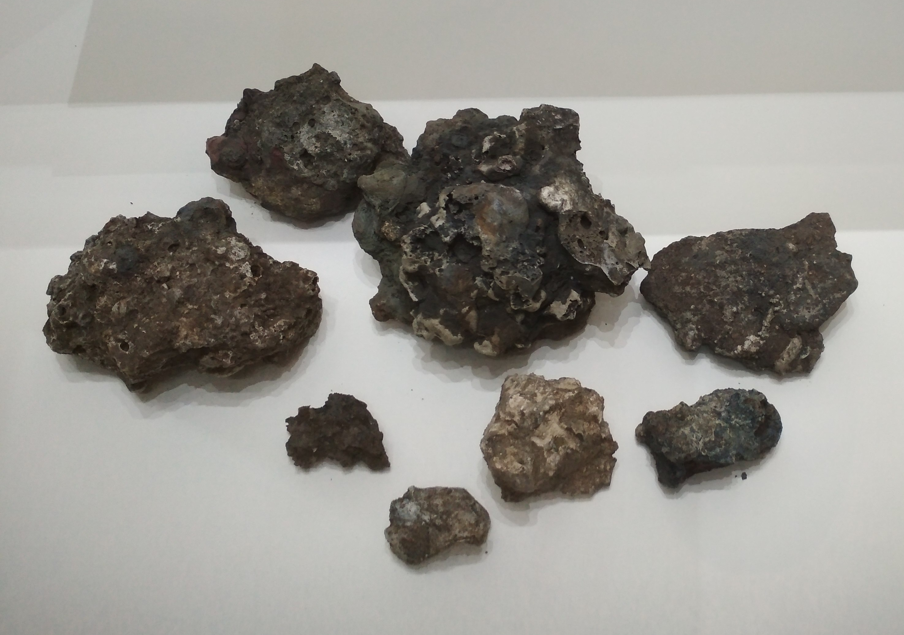 Rauasulatusel tekkiv jääk, mis on ühtlasi otsene viide kohalikule rauasulatustööle. Pole välistatud kohaliku soomaagi kasutamine, mille raua sisaldus võib olla kuni 38,5%. (Pärnu muuseum)